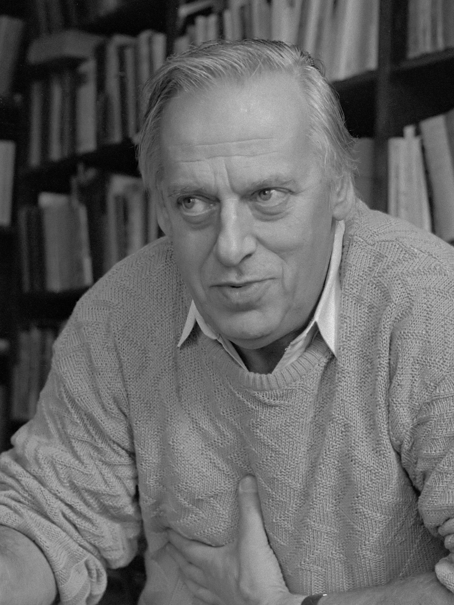 Opdracht Audet, Jan Blokker sr. (kop) 16 juli 1985